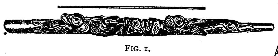 Figure 1, Alaskan Stone Flute - design like a totem-pole.